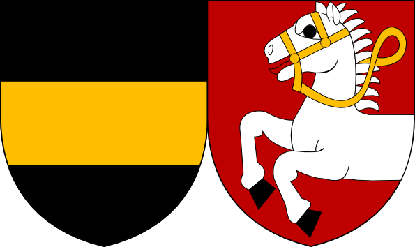 znak arcibiskupa Arnošta z Pardubic